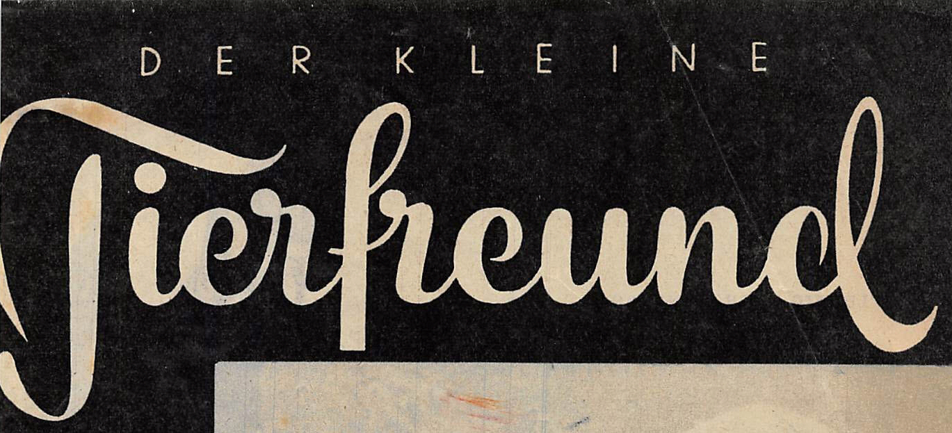 Logo des Kleinen Tierfreunds ab 1949